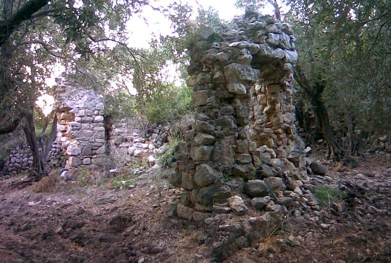 بقايا قصر هيلانة بنت الملك في يلدة مشتى عازار